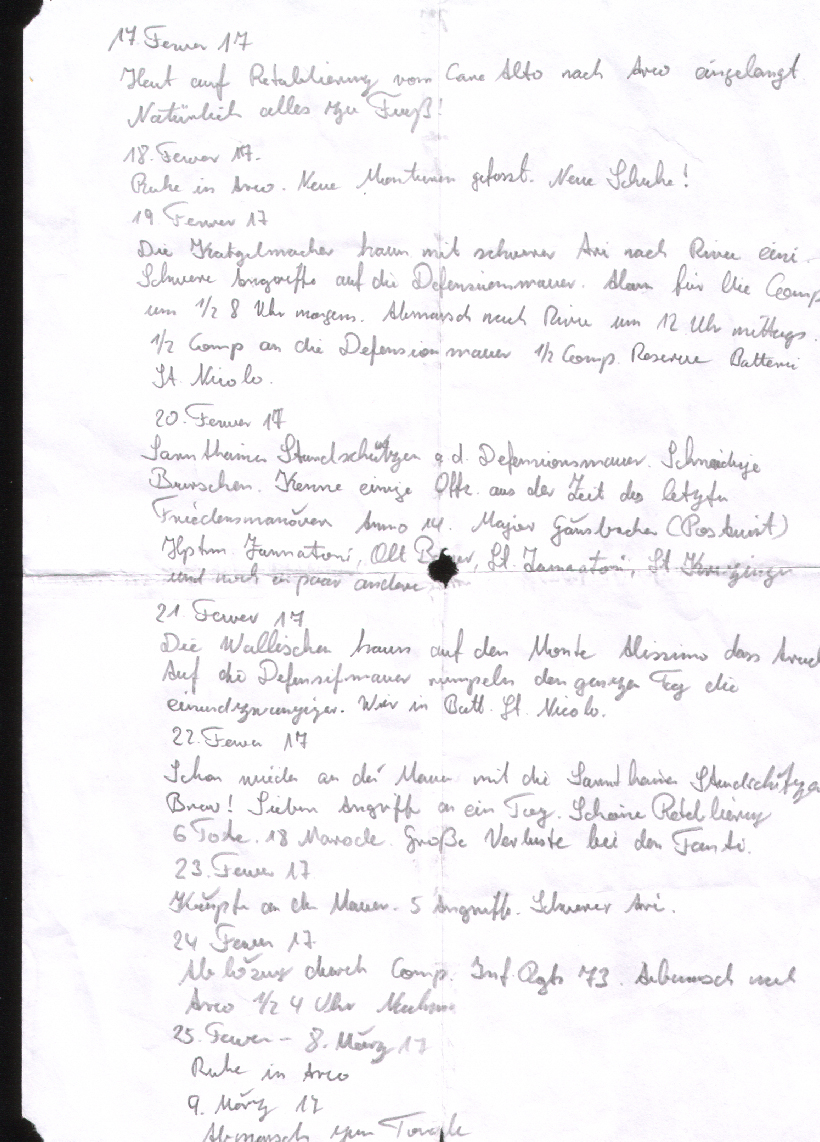 Tagebuchseite des Franz Pomykahler von 1917 Kaiserschützen Regiment "Innichen" Nr. III